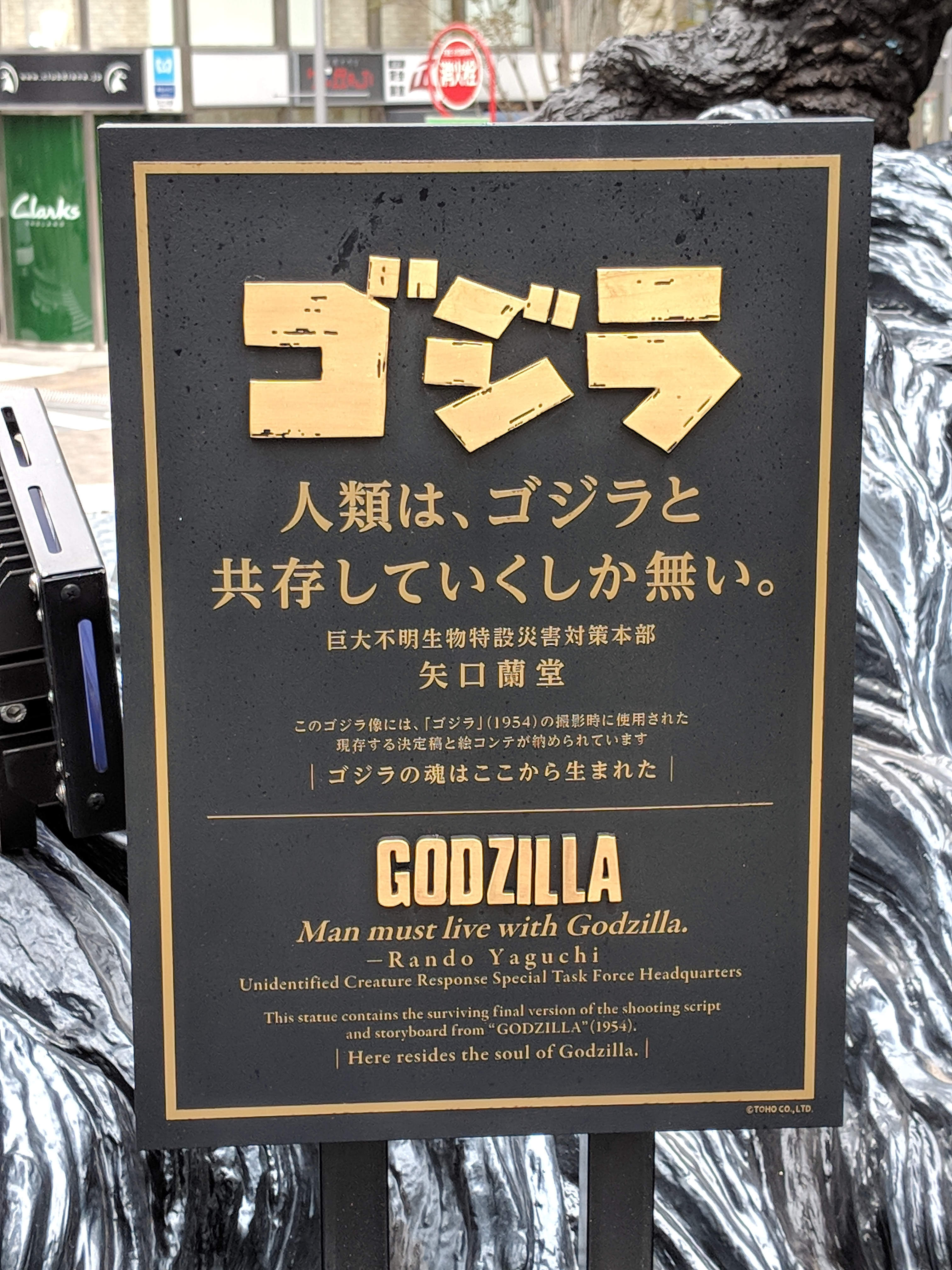 Japan Trip 2018 0236